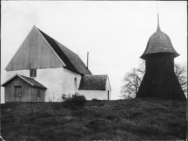 Kyrkan och klockstapeln från sydväst. Kategori: (01) ExteriörerKyrkan och klockstapeln från sydväst.